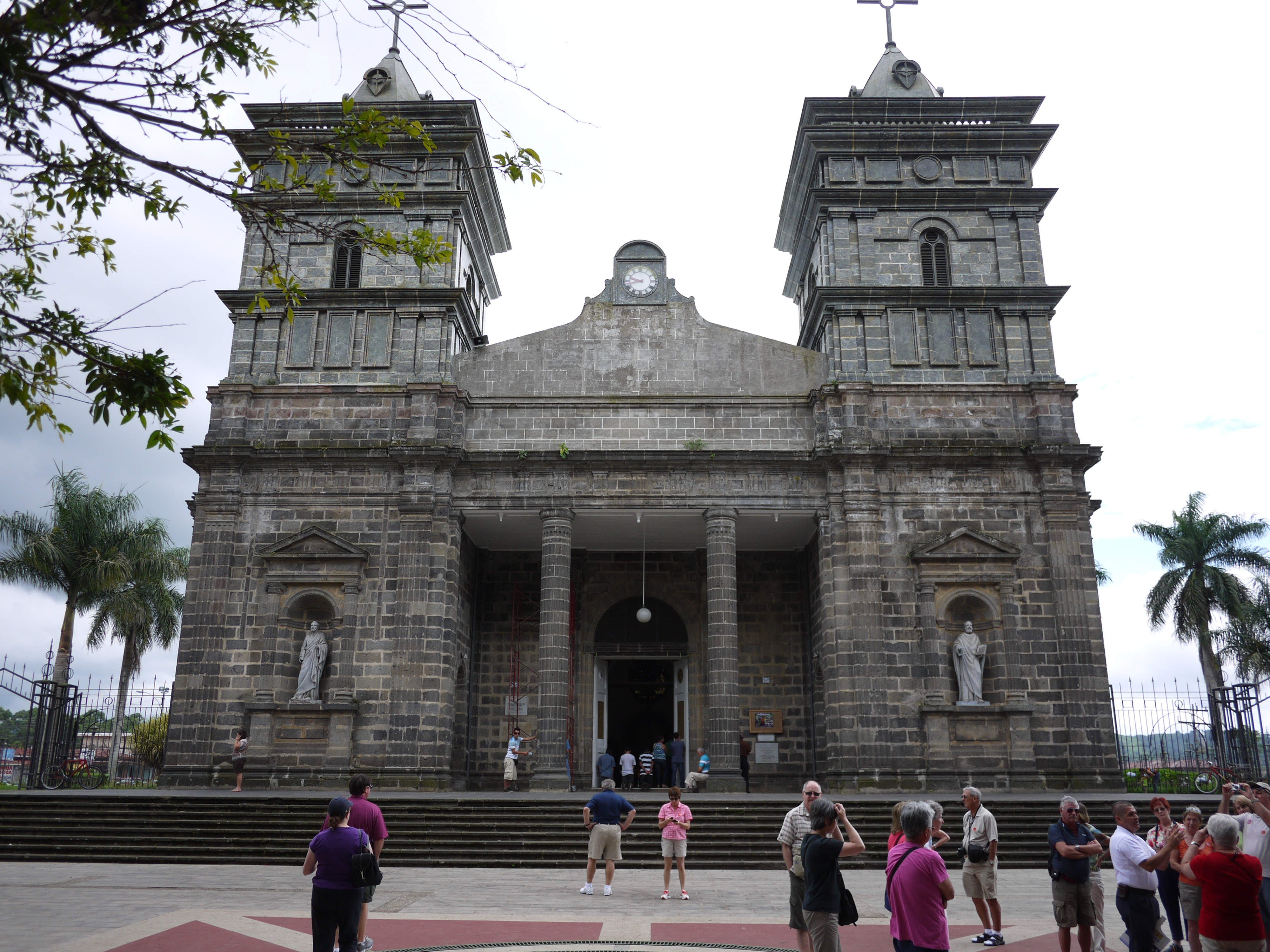 Iglesia de Palmares, Costa Rica